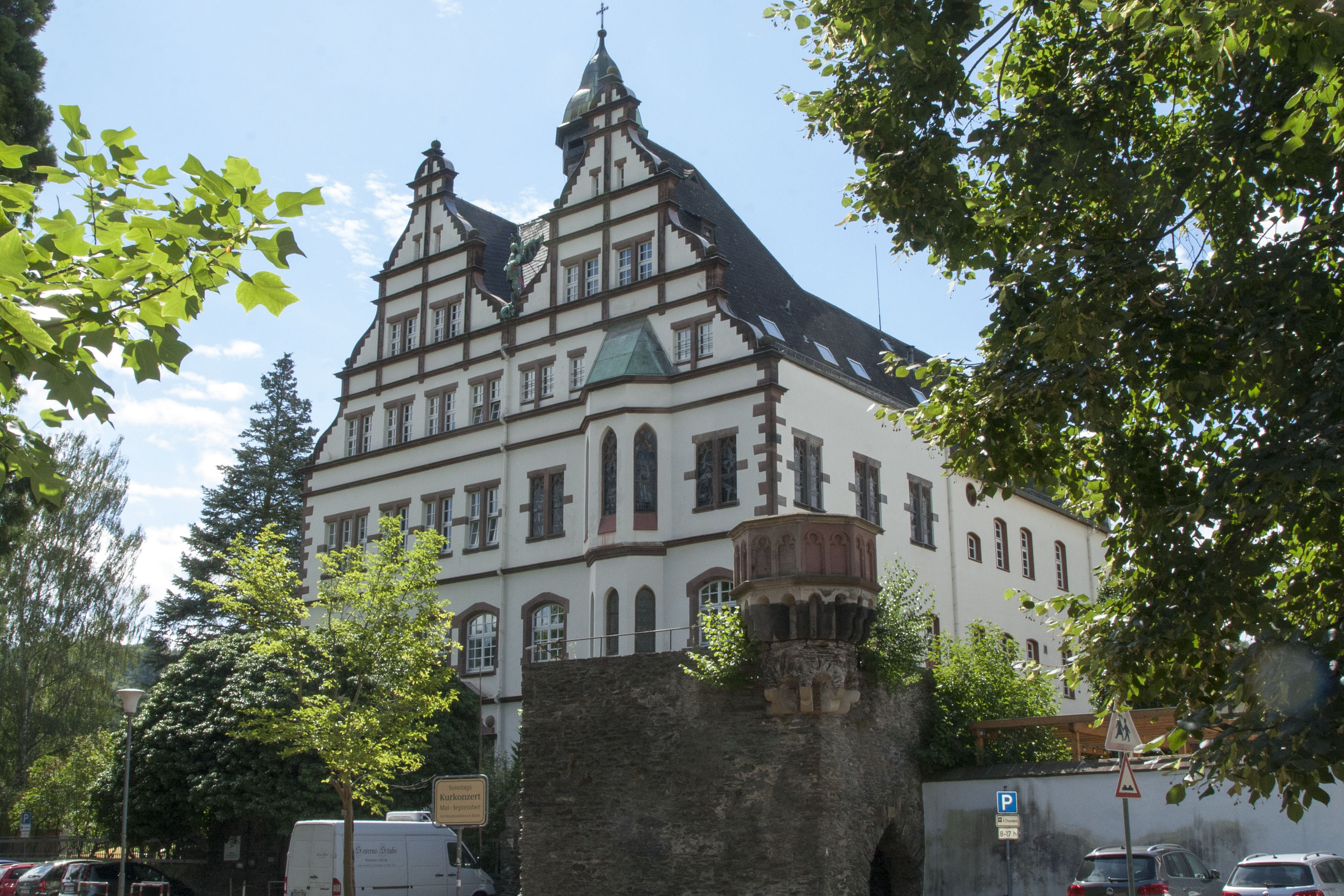 Die Nordfassade des Gemeindezentrums St. Michael der katholischen Pfarrei St. Severus in Boppard